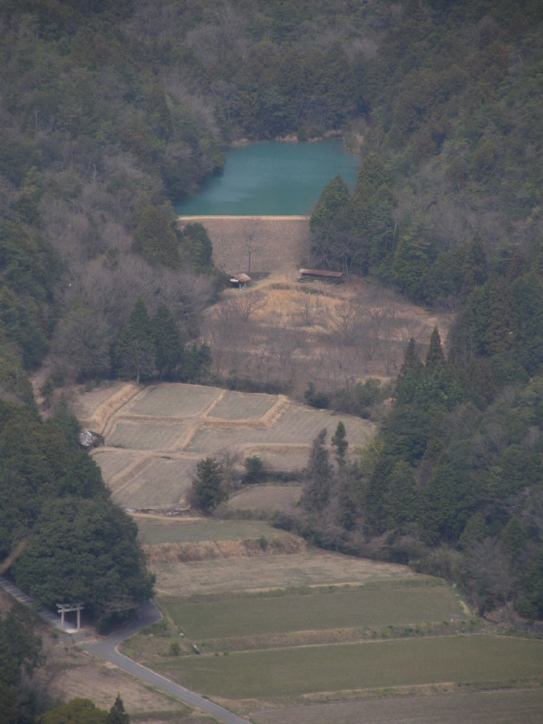 兵庫県加東市の山池